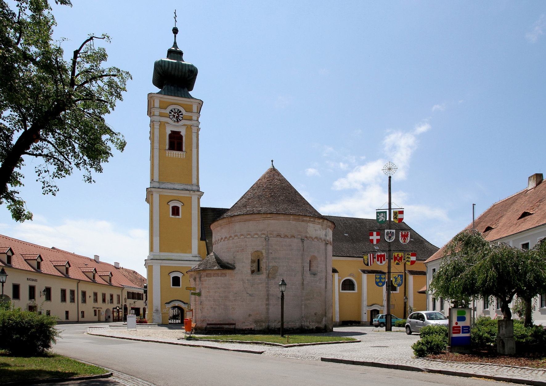 Der Karner in Hadersdorf am Kamp, ein Ortsteil der niederösterreichischen Marktgemeinde Hadersdorf-Kammern.